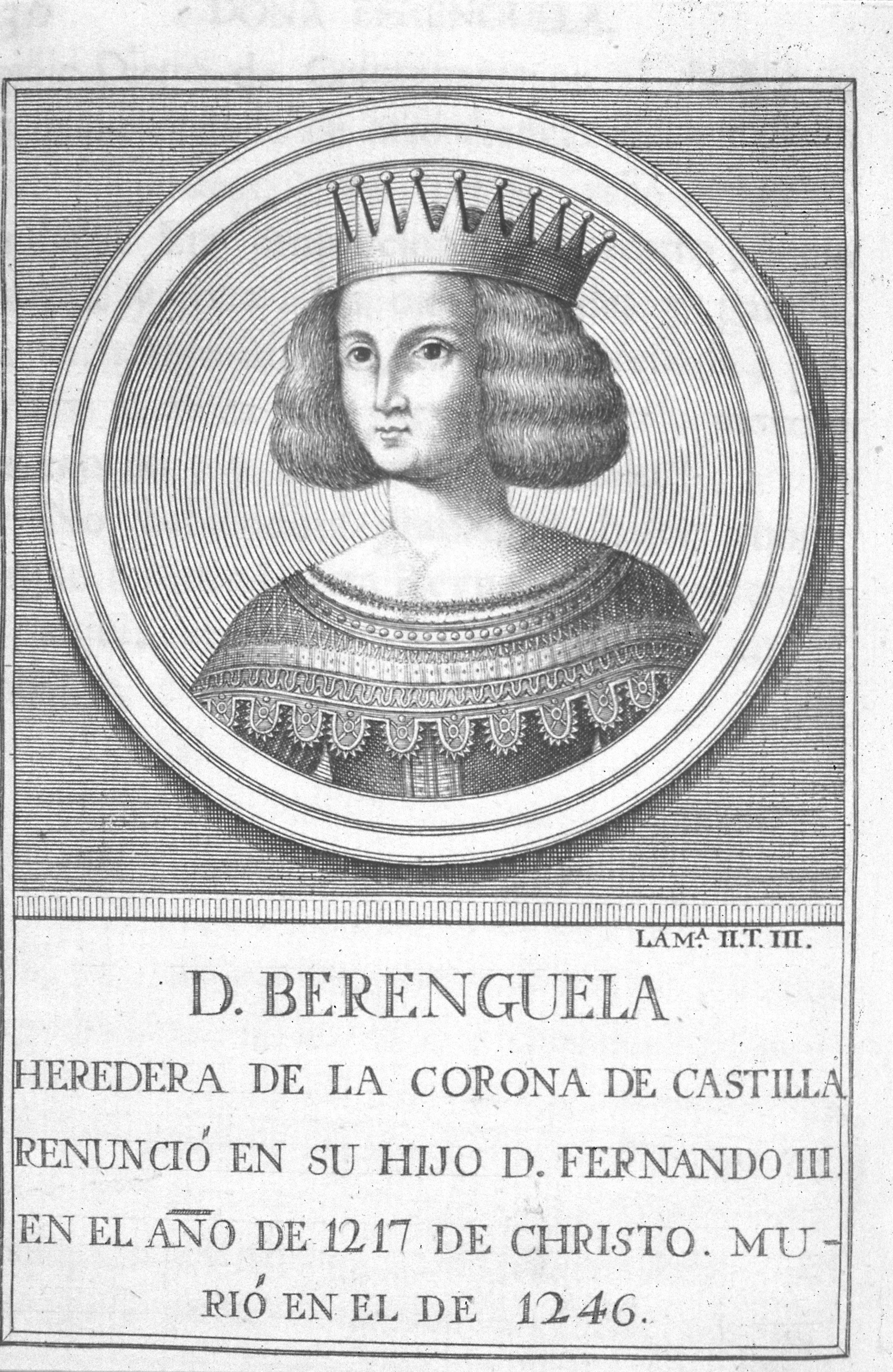 Berenguela, La Grande. Reina de Castilla[1] en 1217 y reina consorte de León entre 1197 y 1204.